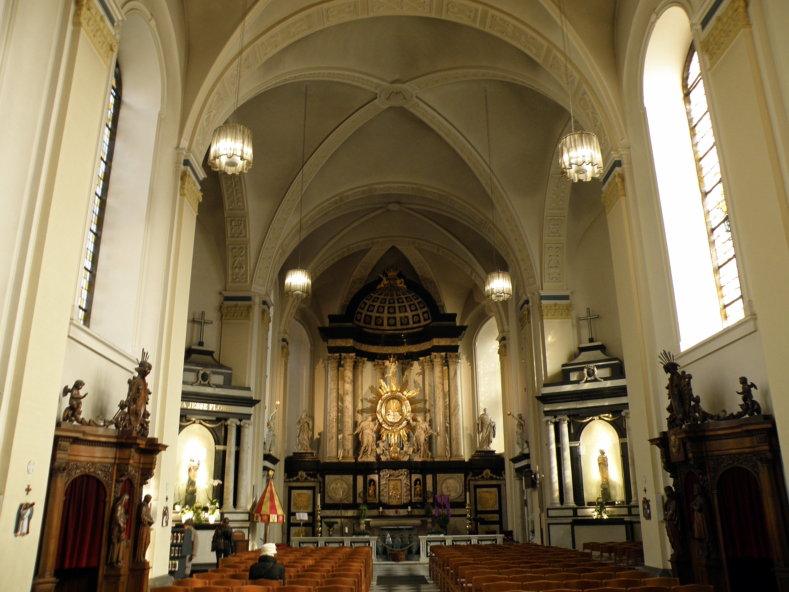 Hasselt (prov. Limburg, België). Virga Jessebasiliek, Kapelstraat.